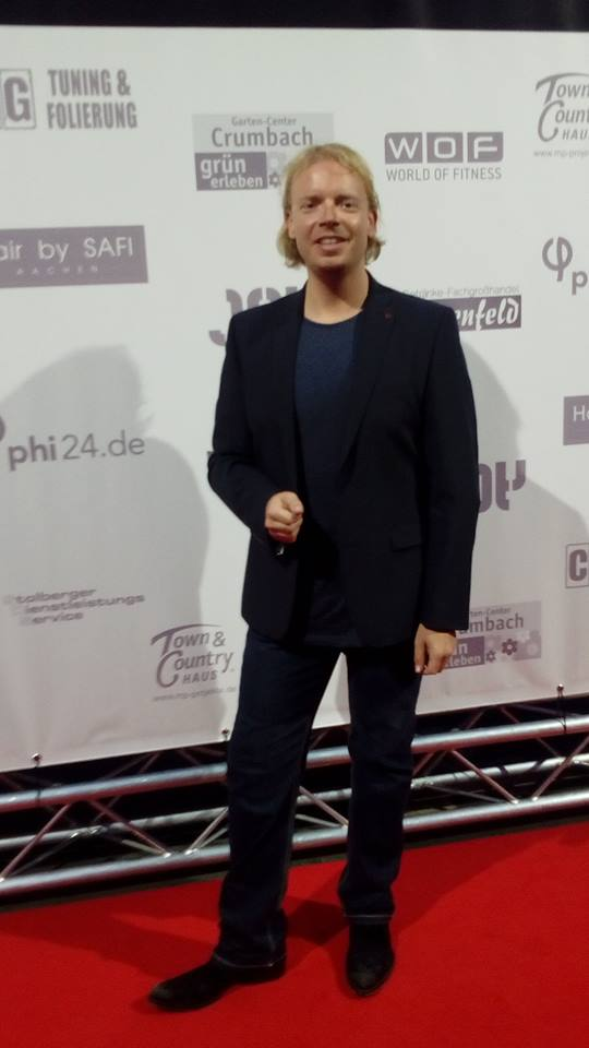 René Blanche bei der Ac Night